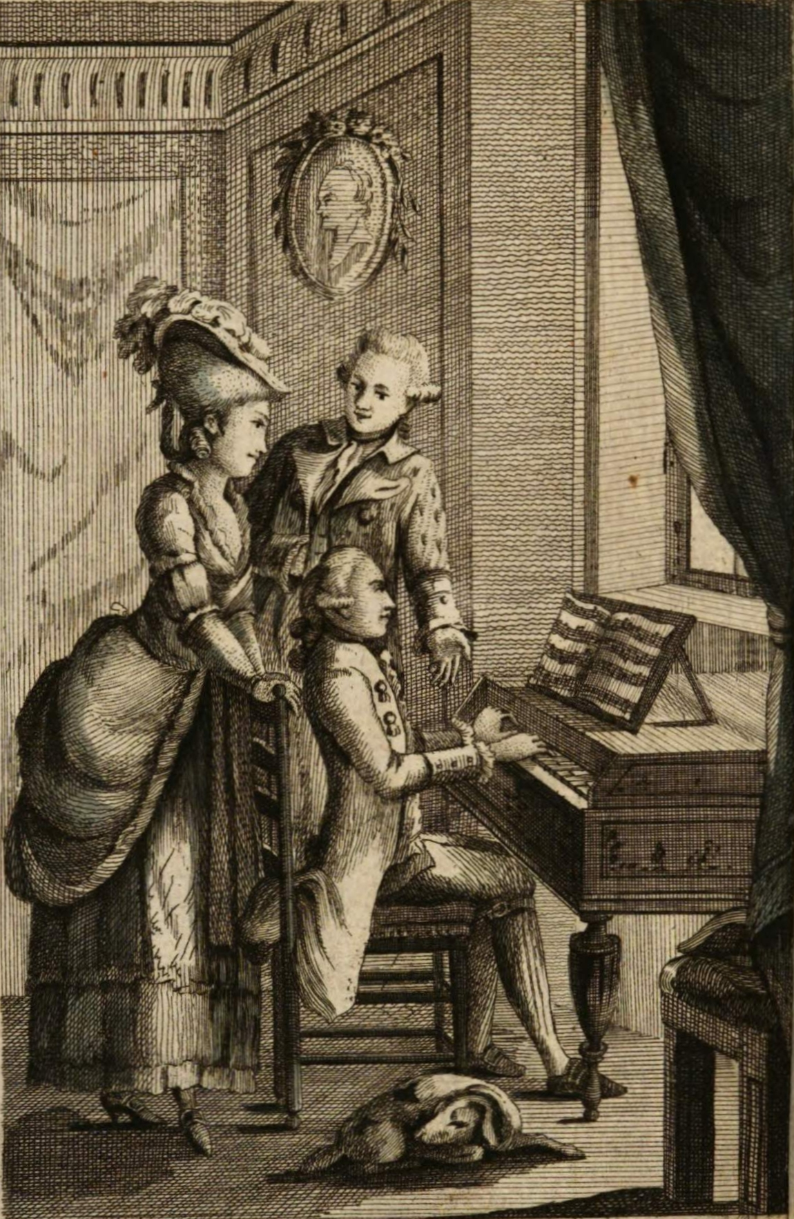 Hausmusikszene, eine Person Klavier spielend, zwei weitere stehen, sich unterhaltend, daneben. - Stich von Heinrich Philipp Boßler nach einer Zeichnung von Viktor Wilhelm Peter Heideloff. Bezeichnet: Links unter Bildfeld: "Vict. Heideloff del." Rechts unter Bildfeld: "Boßler sc". Speyer, 1782. – Stich: 18,7 × 10,5 cm.